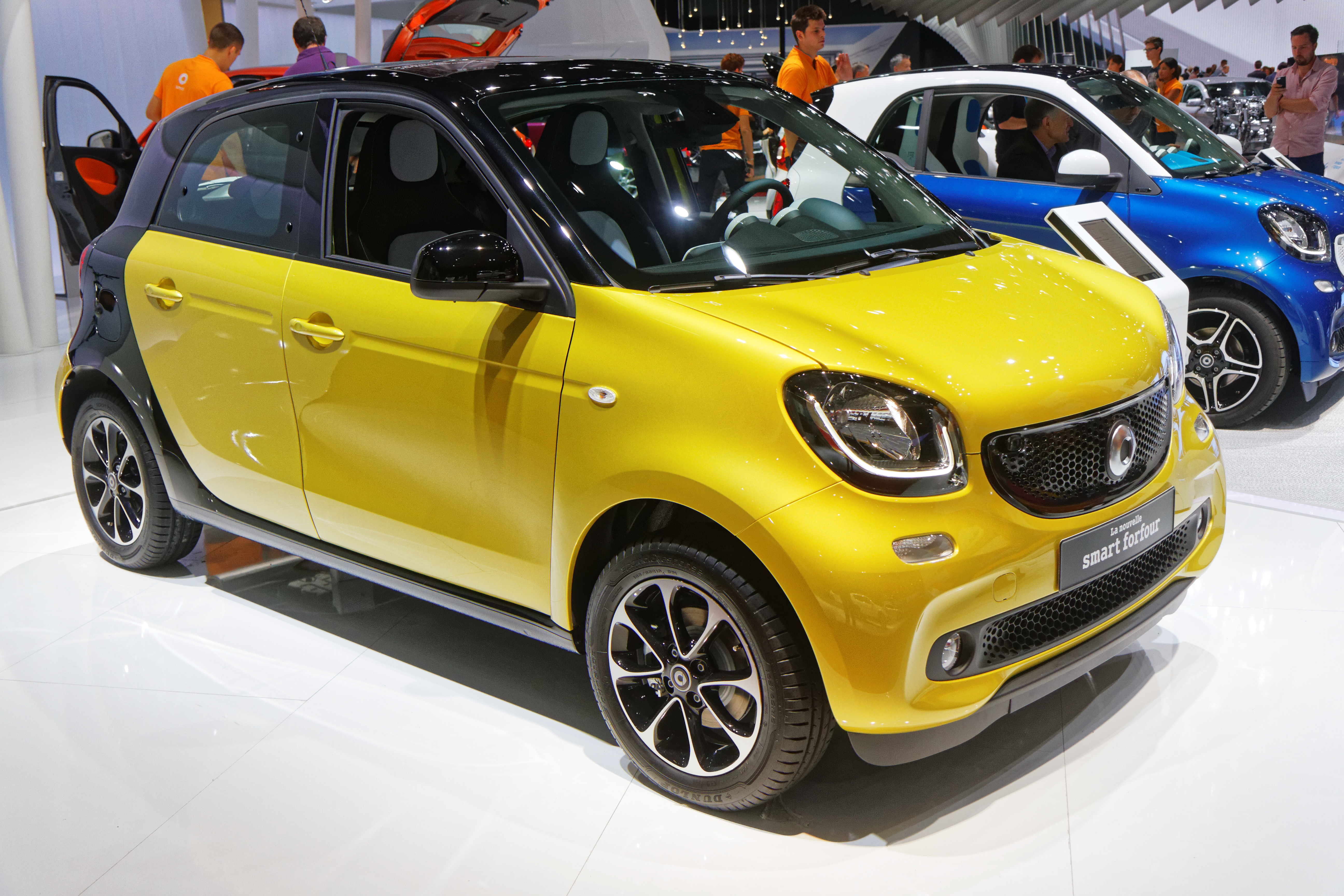 Une Smart Forfour présentée lors du mondial de l'automobile de Paris 2014.